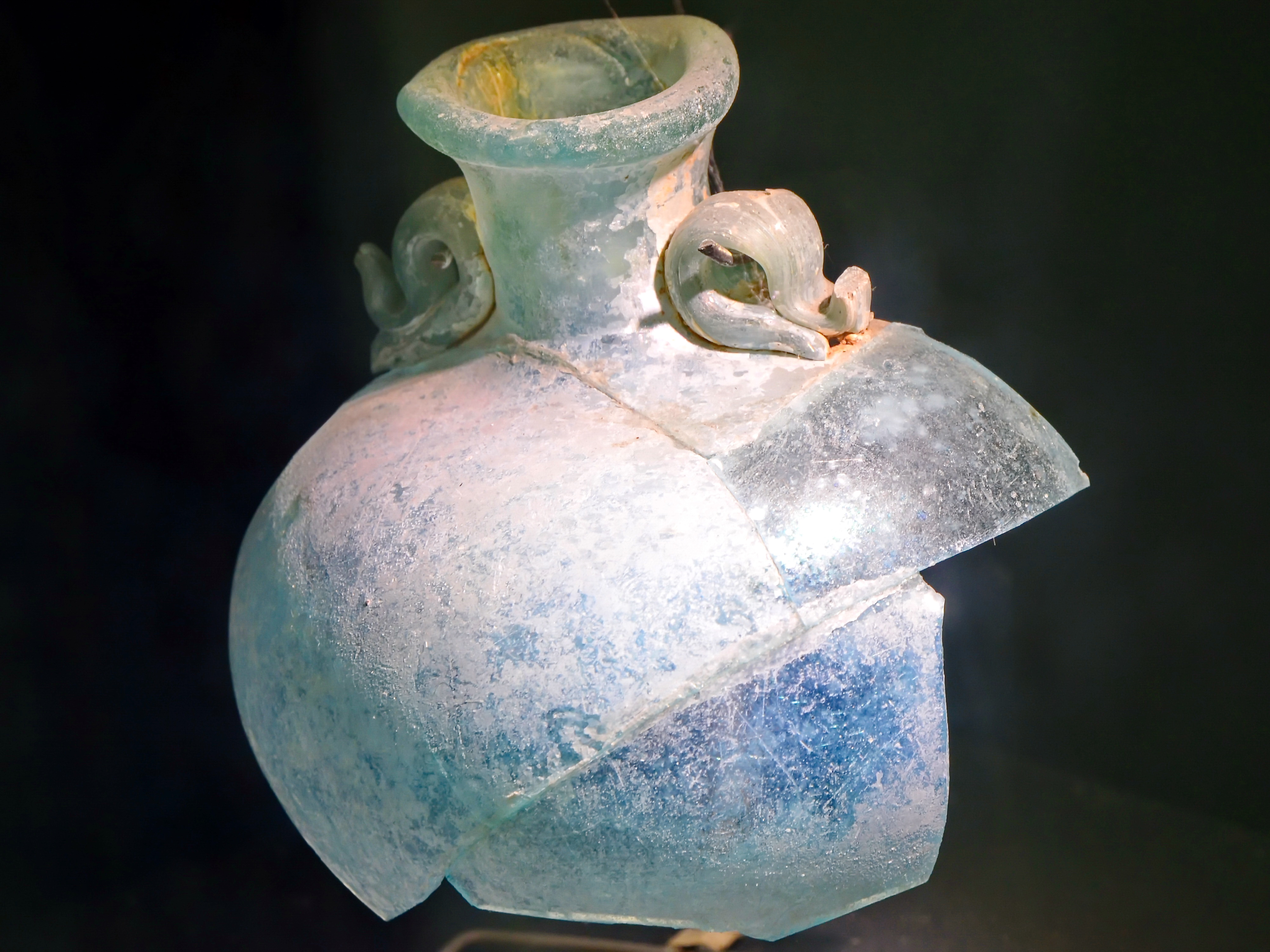 Exponat aus der Thermengasse im einstigen römischen vicus Turicum (Zürich) : Bruchstücke eines Salbölfläschchens aus einem Abwasserkanal von Bad I (gemäss Beschriftung in der Vitrine)